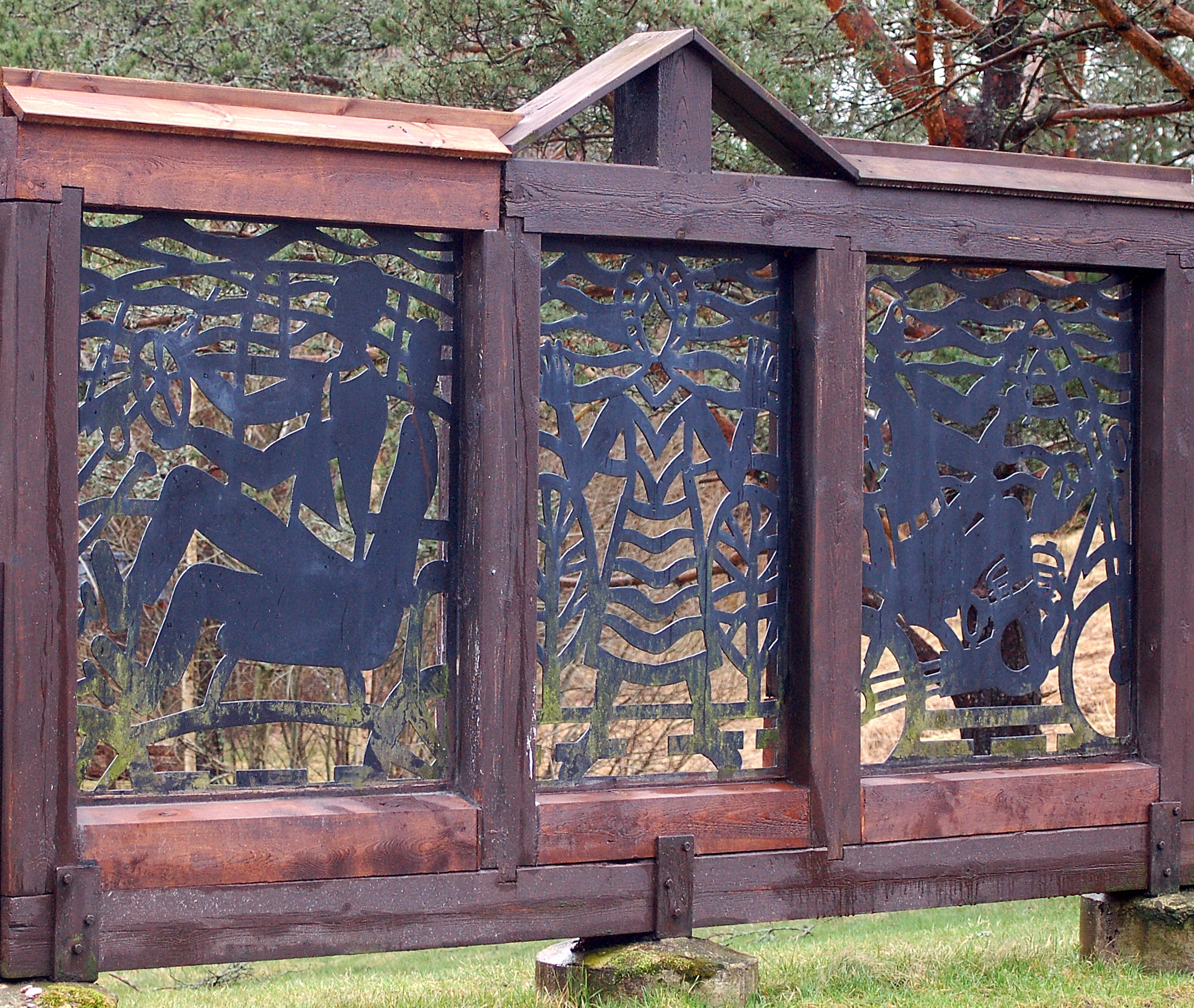 Kulturrikets rastplats nr 36 Stolpen med utsmyckningen "Ikon för vägfarande" av Kjell Sundberg från Kristinehamn.